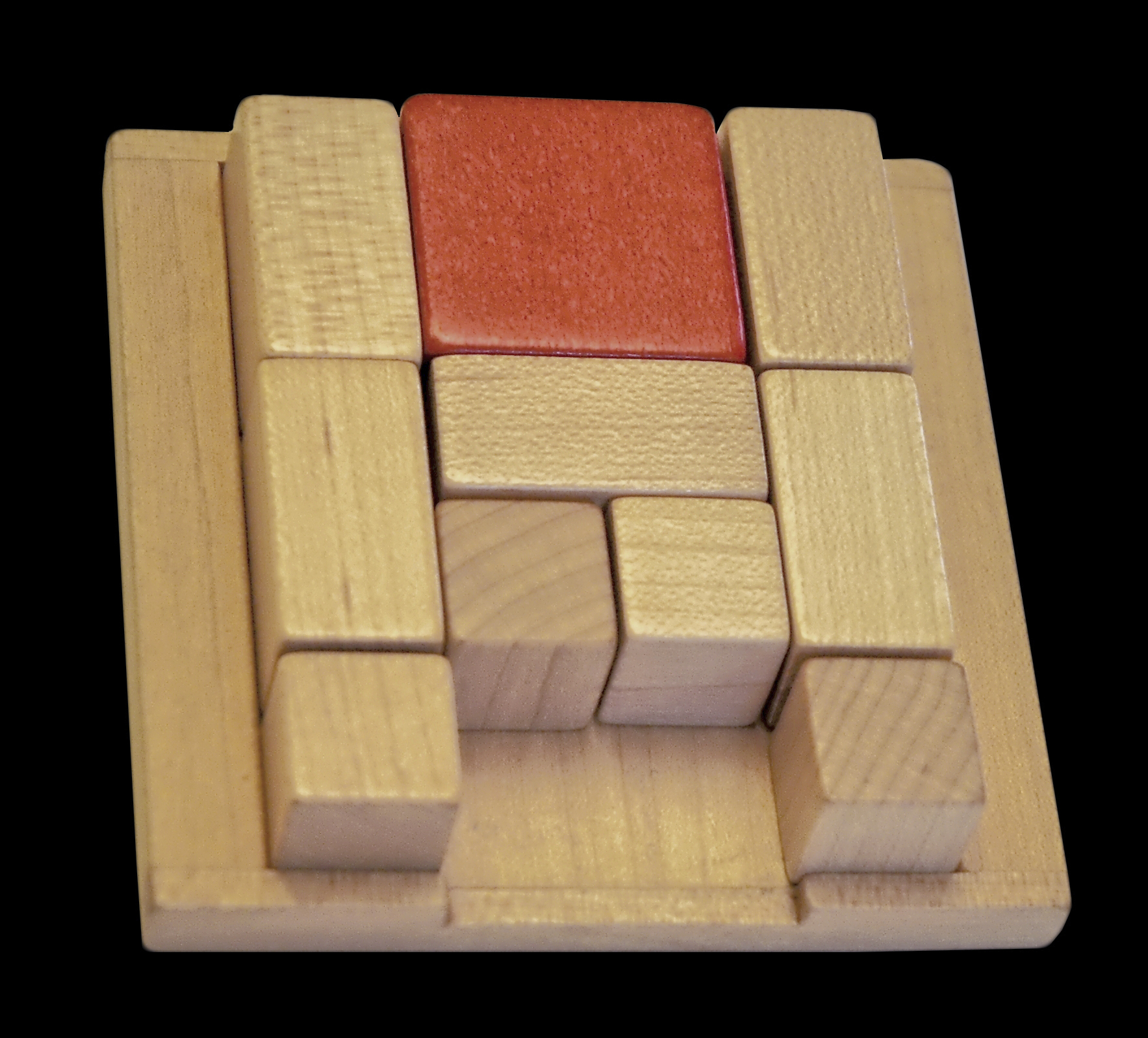 Quo Vadis (lateinisch für "wohin gehst du?") ist ein anspruchsvolles Denkspiel und Schiebepuzzle aus Holz für einen Spieler von HABA (Spiel Nummer 2480). Heute wird das Spiel von HABA als Luzifix Nr. 2 - Teufelslabyrinth vertrieben.